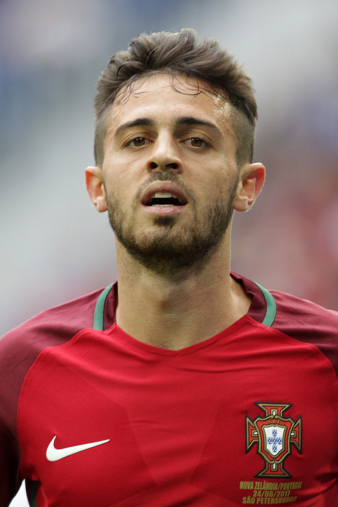 Новая Зеландия - Португалия